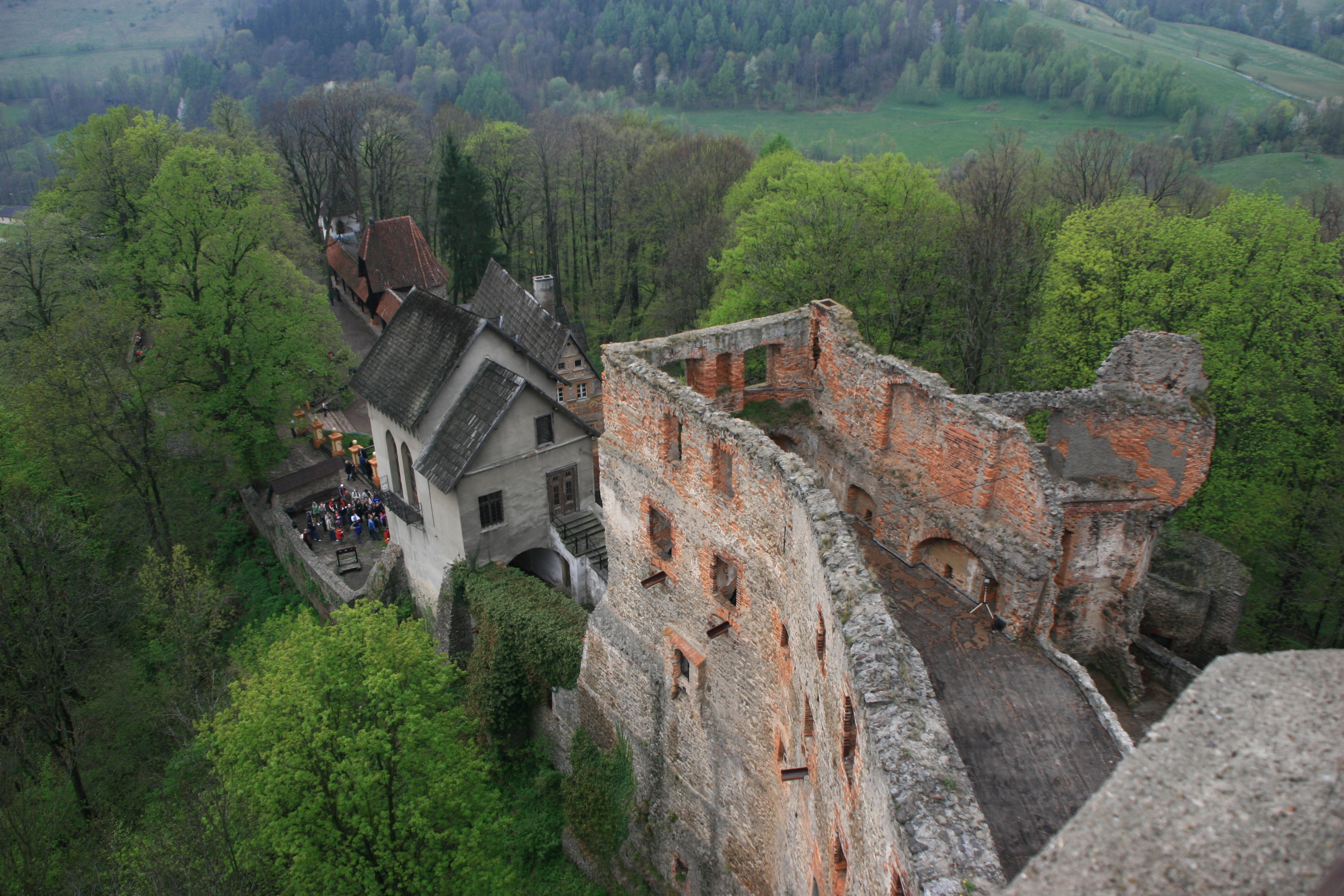 zamek „Grodno”, 1 poł. XIV, XV, 2 poł. XVI, 1868-69, 1904 Zagórze Śląskie, Walim